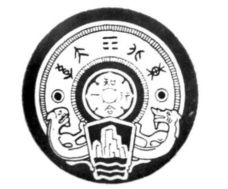 东北大学旧校徽，1929年林徽因设计